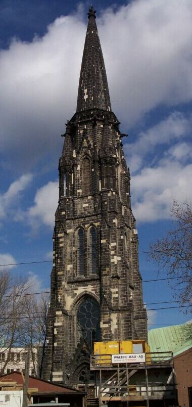 Bild aus Bochum, selbst aufgenommen, GFDL